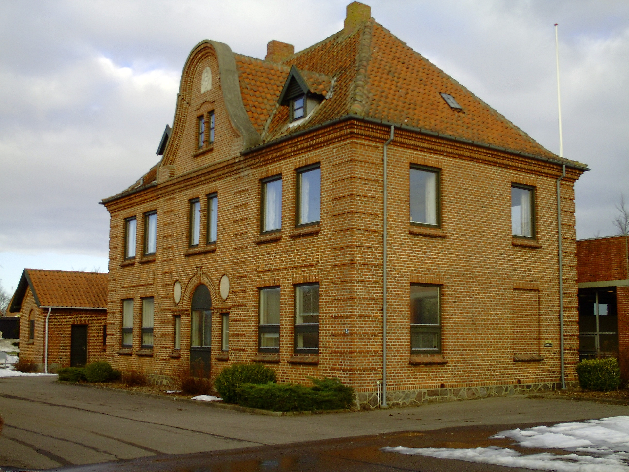 Langelandsbanens gamle station i Humble, Langeland